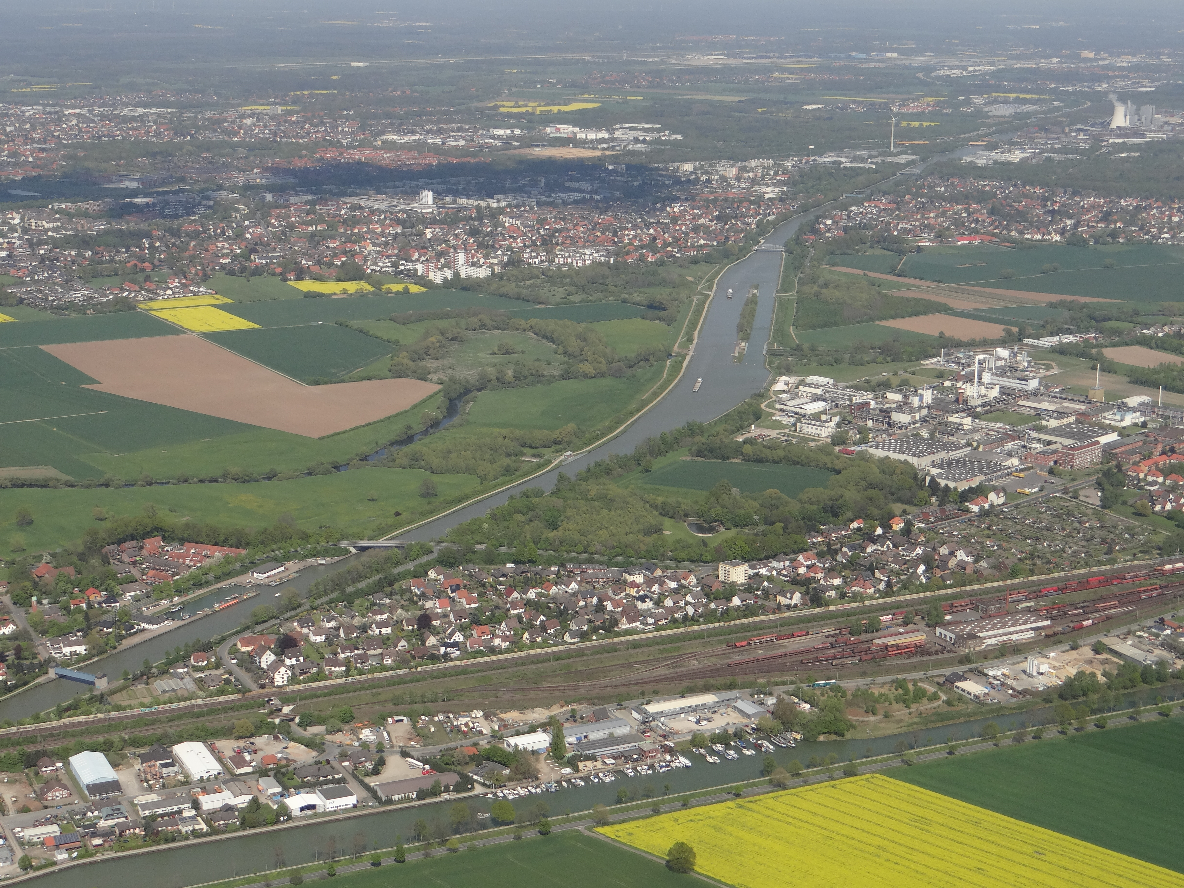 Luftbild des Mittellandkanals zwischen Seelze und Garbsen (diagonal durch das Bild). Im Vordergrund der Stichkanal Linden.